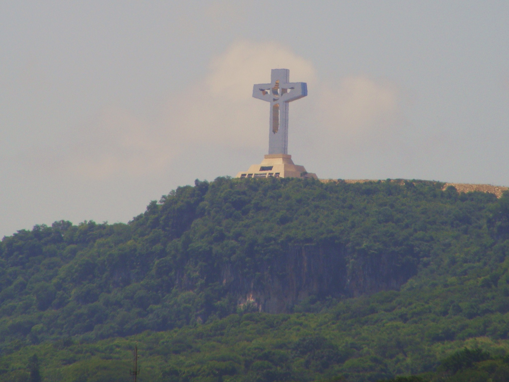 Cristo de Copoya.